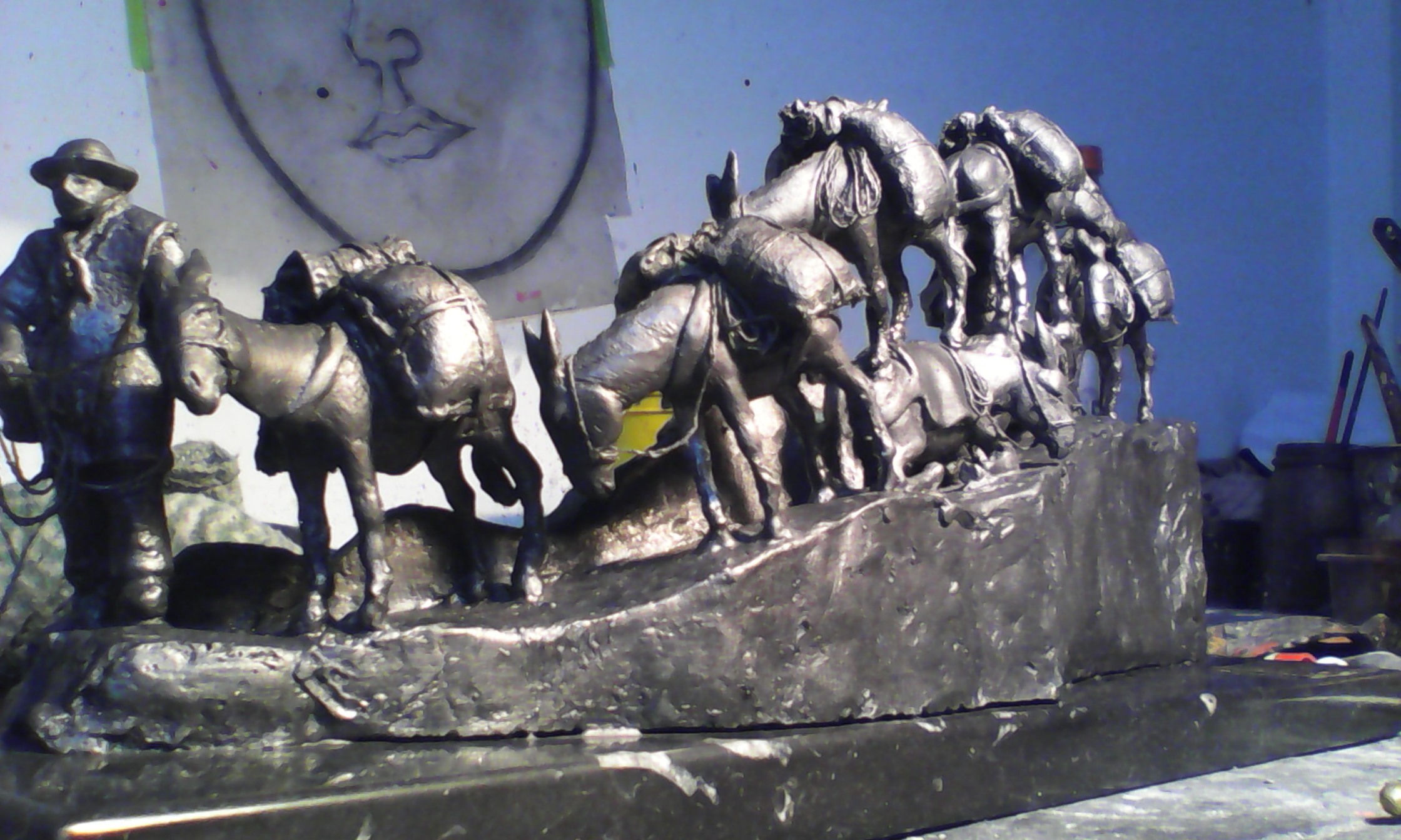 Obra en Cobre, y acrilico, Tecnica Mixta la cual ilustra labores de arrieria, Colombia